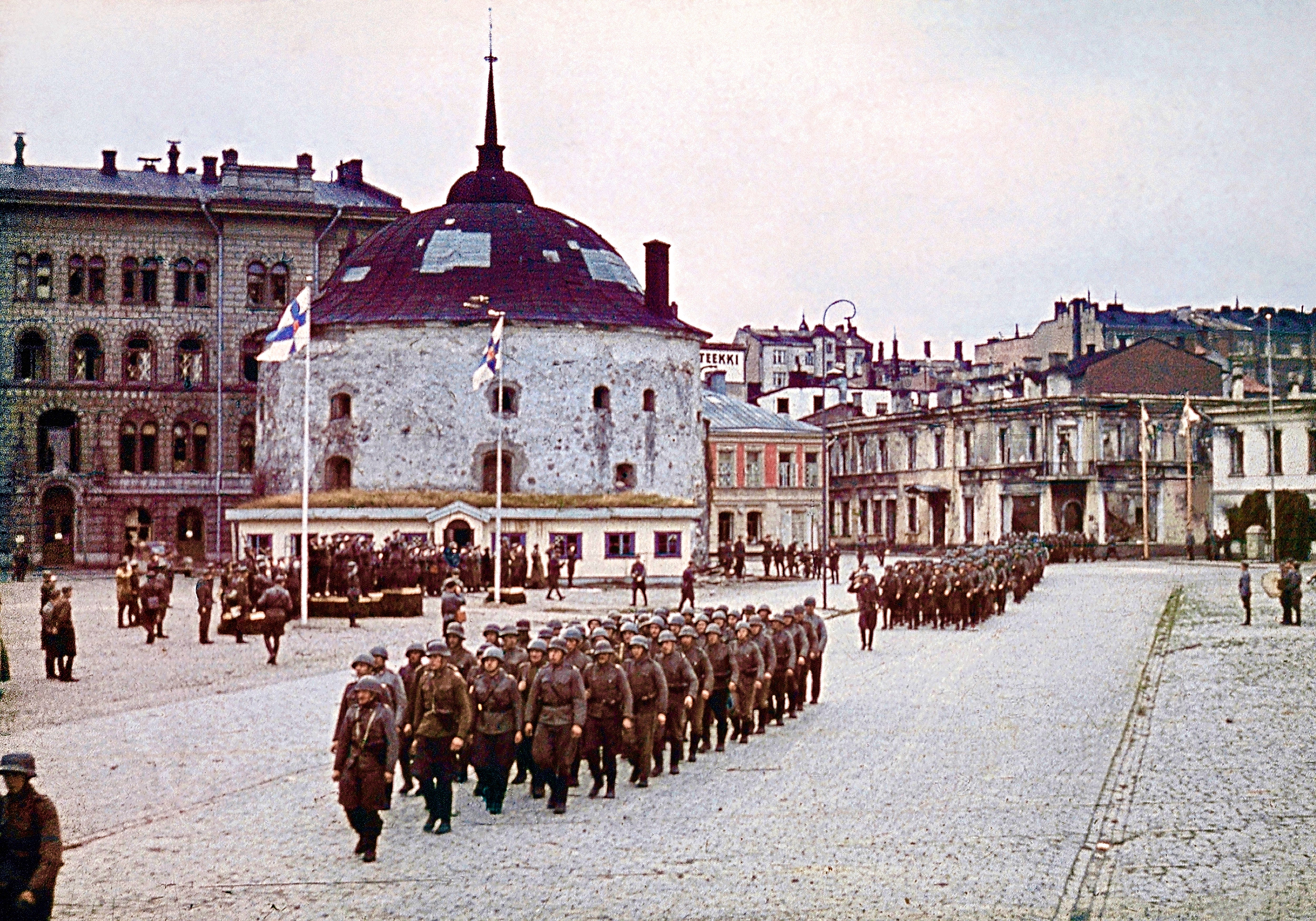 Viipurin valtauksen kunniaksi järjestetty paraati Pyöreän tornin edustalla.